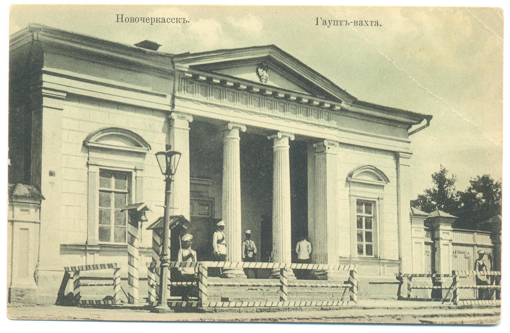 Гарнизонная гауптвахта в начале XX века